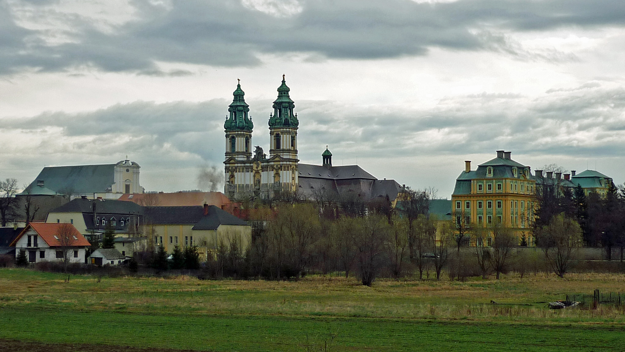 Krzeszów, Woiwodschaft Niederschlesien (Grüssau) - Kloster